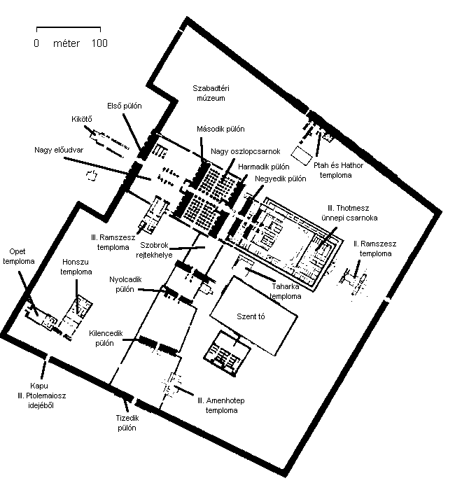 Ámon karnaki templomkörzetének alaprajza.